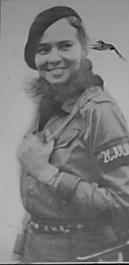 Vilma Espín